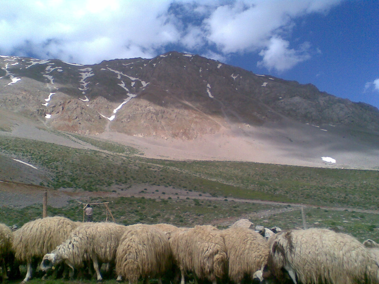 Cebe, Çemişgezek